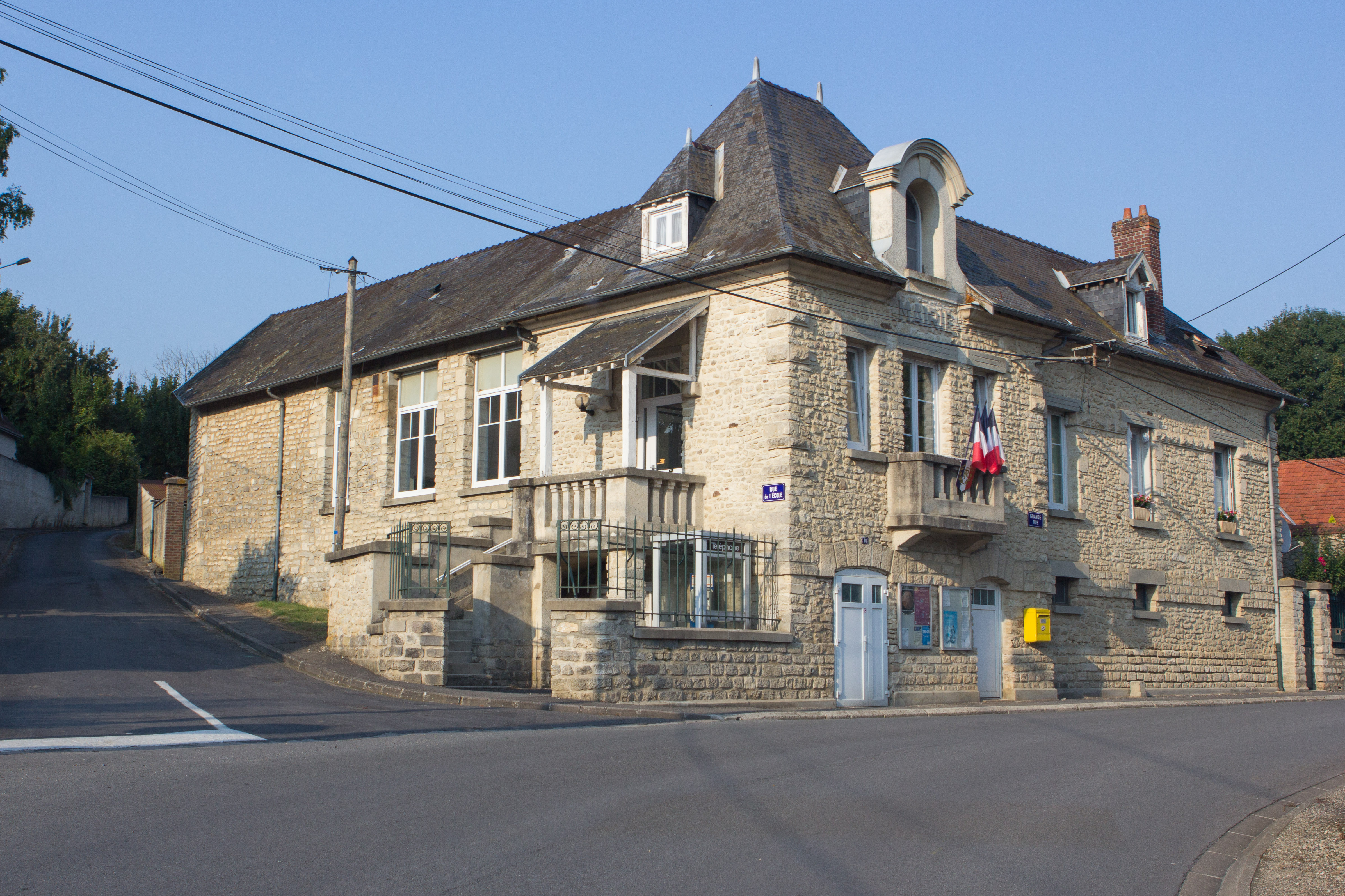 Mairie de Craonnelle / Craonnelle, Aisne, France